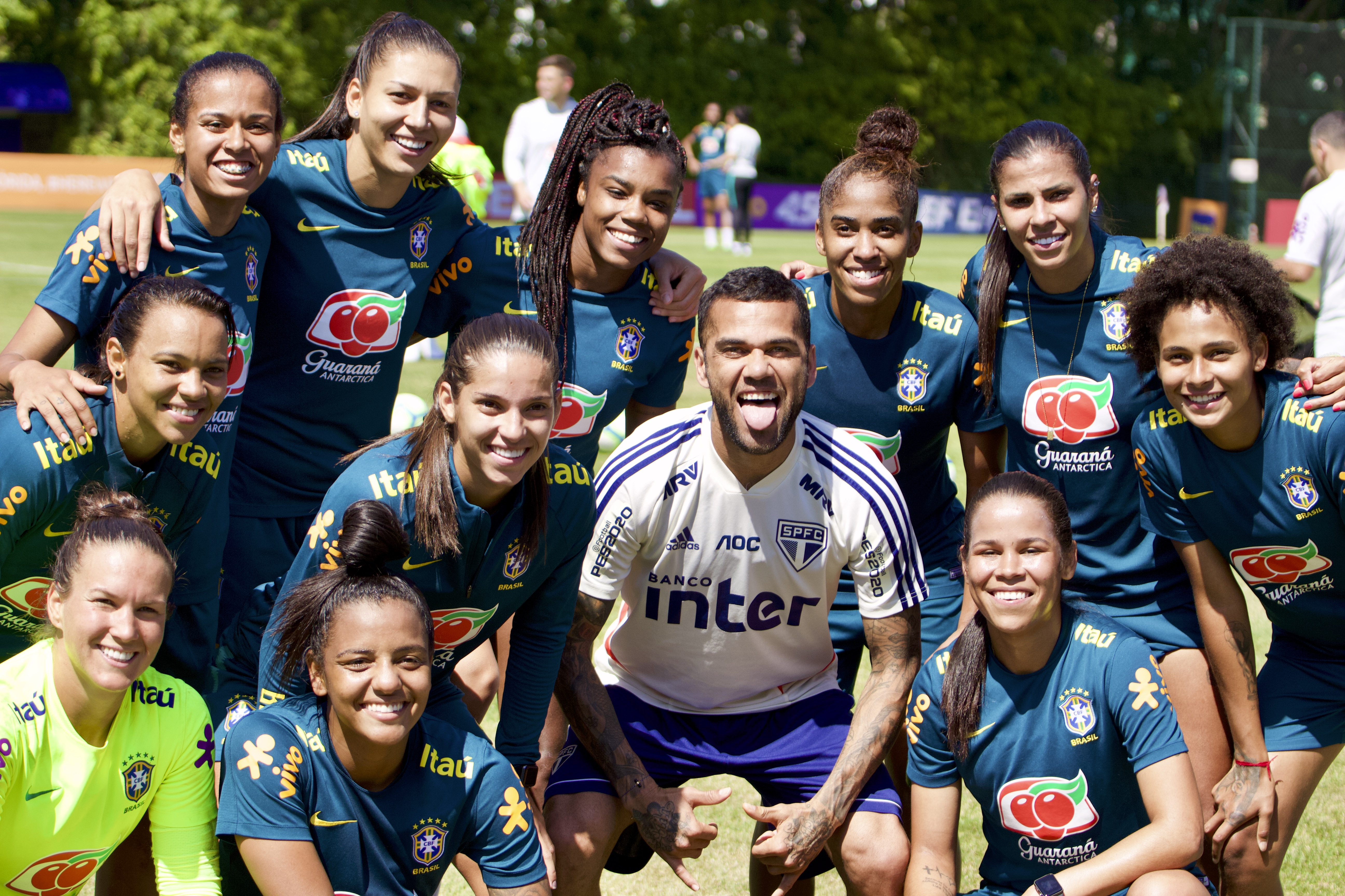 Selecao bresilienne a l entrainement reçu au SPFC par Dani Alves